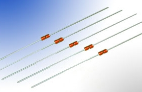 Ejemplo de termistor en configuración axial